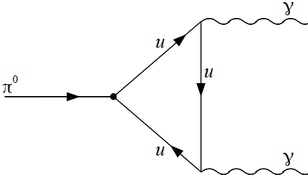 Diagram Feynmana dotyczący procesu rozpadu pionu obojętnego na dwa fotony